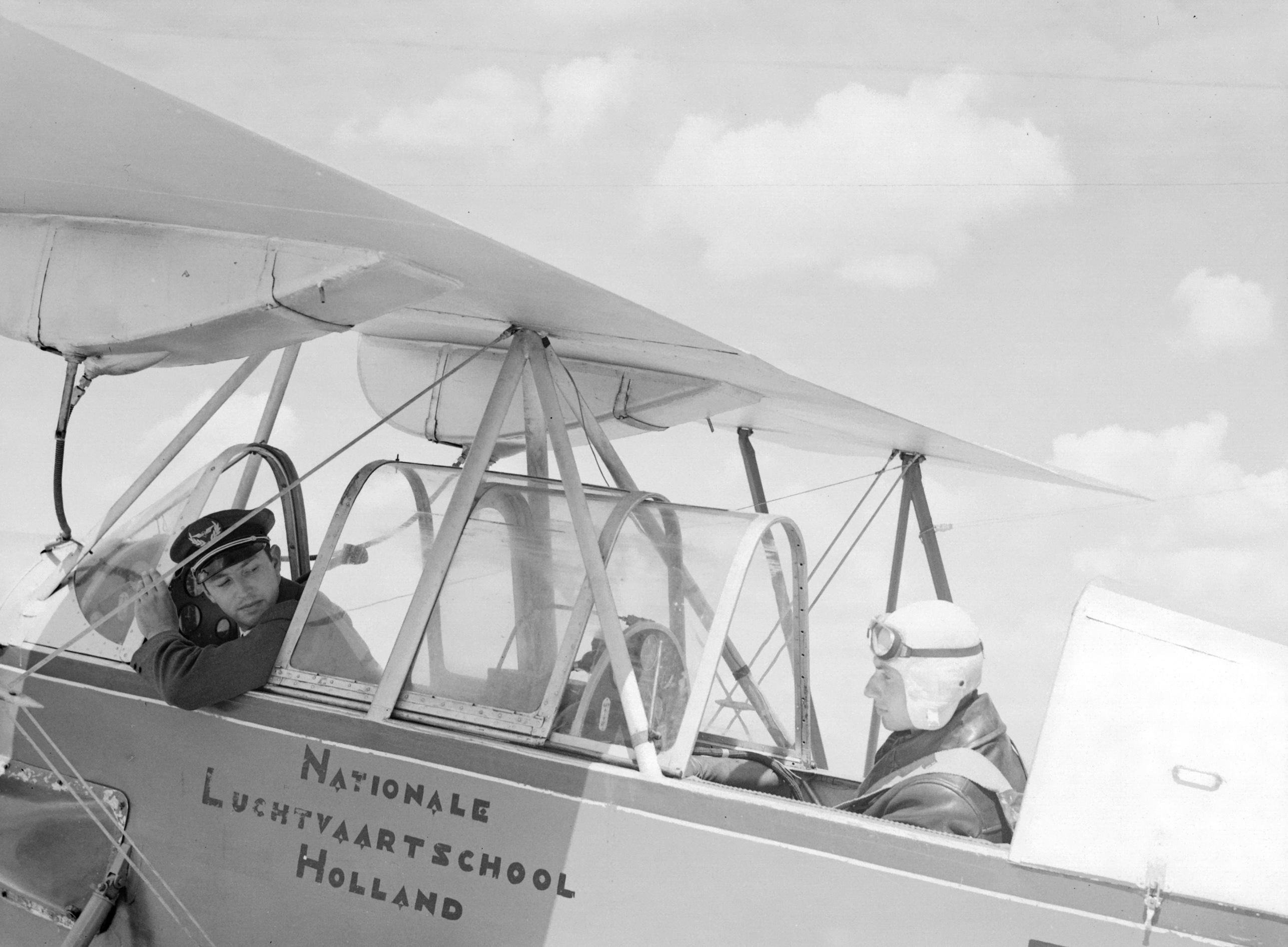 Collectie / Archief : Fotocollectie Van de Poll Reportage / Serie : Nationale Luchtvaartschool Holland Beschrijving : Een Koolhoven FK-46 lesvliegtuig door zijn dociele vlieggedrag bijgenaamd 'Koe of Koebeest' van de Nationale Luchtvaart School Holland te Amsterdam Schiphol met instructeur en cursist. Annotatie : De Nationale Luchtvaartschool had vestigingen in Rotterdam Waalhaven en Amsterdam Schiphol Datum : 1933 Locatie : Amsterdam, Rotterdam Trefwoorden : leerlingen, leraren, piloten, vliegopleidingen, vliegtuigen Persoonsnaam : Frits Koolhoven Fotograaf : Poll, Willem van de Auteursrechthebbende : Nationaal Archief Materiaalsoort : Negatief (zwart/wit) Nummer archiefinventaris : bekijk toegang 2.24.14.02 Bestanddeelnummer : 255-8621